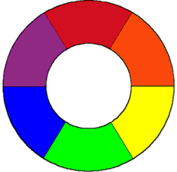 Colori disposti lungo la ruota cromatica di Goethe: Porpora, Arancione, Giallo, Verde, Blu, Violetto